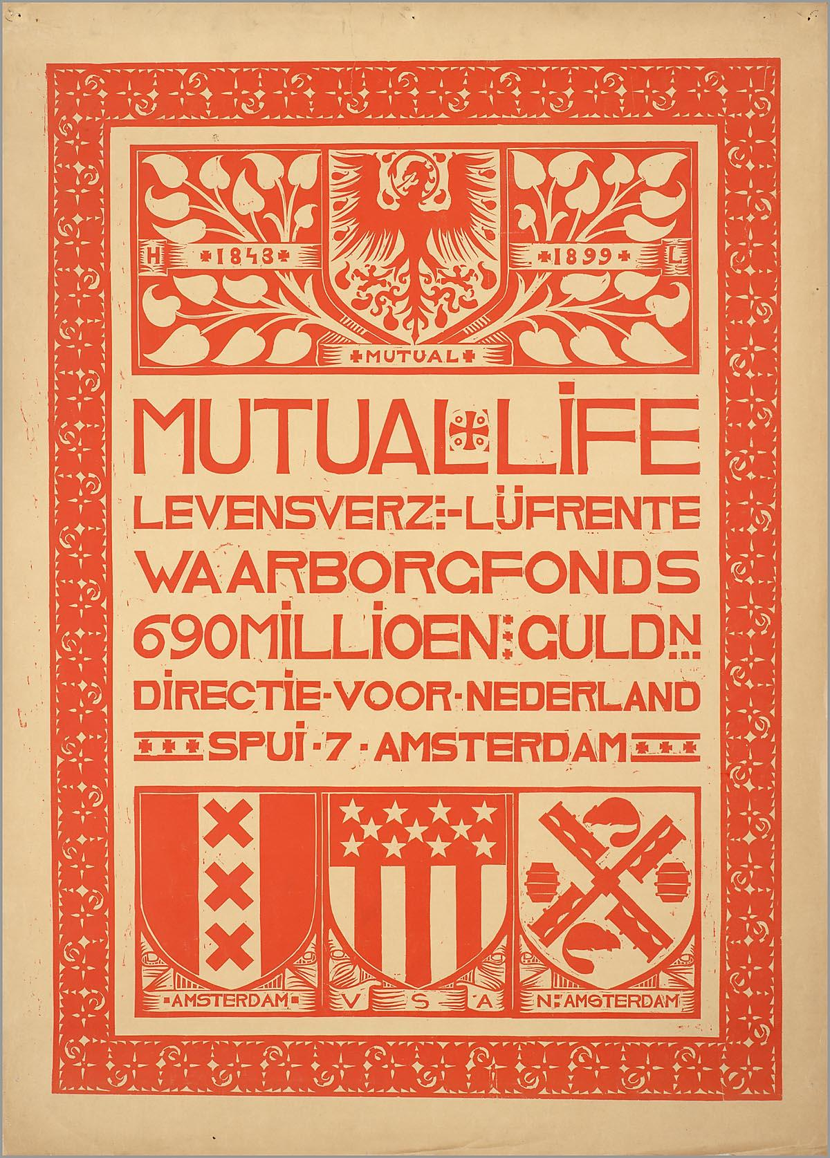 Affiche: Mutual Life levensverz.-lijfrente. Waarborgfonds 690 millioen guldn.